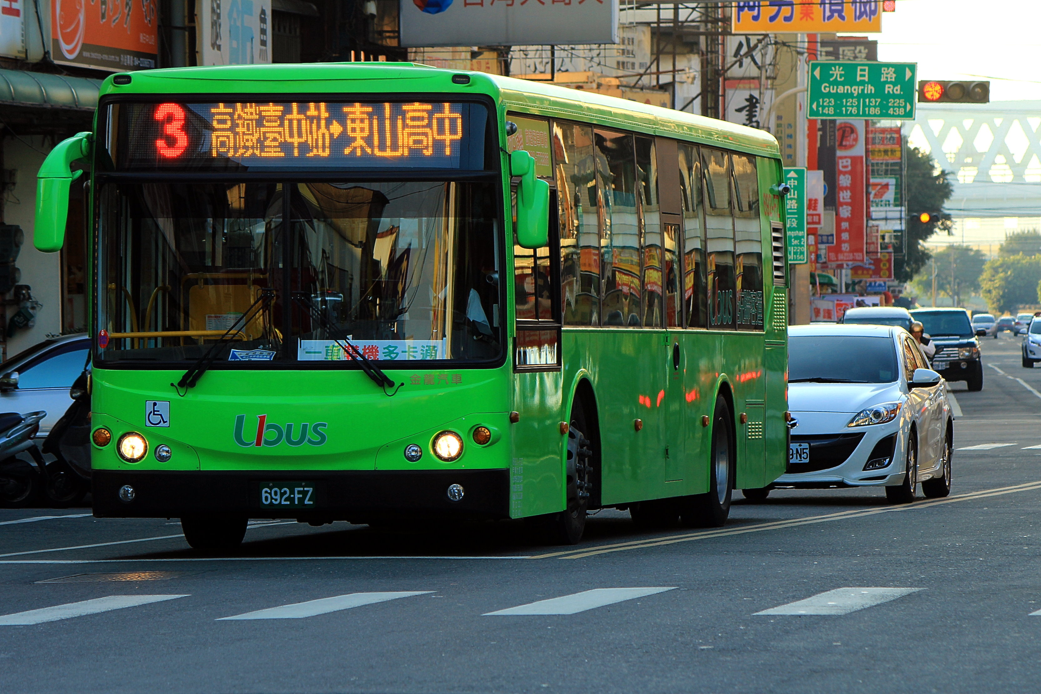 2013〈2013〉 KINGLONG KL6112U1（金龍）